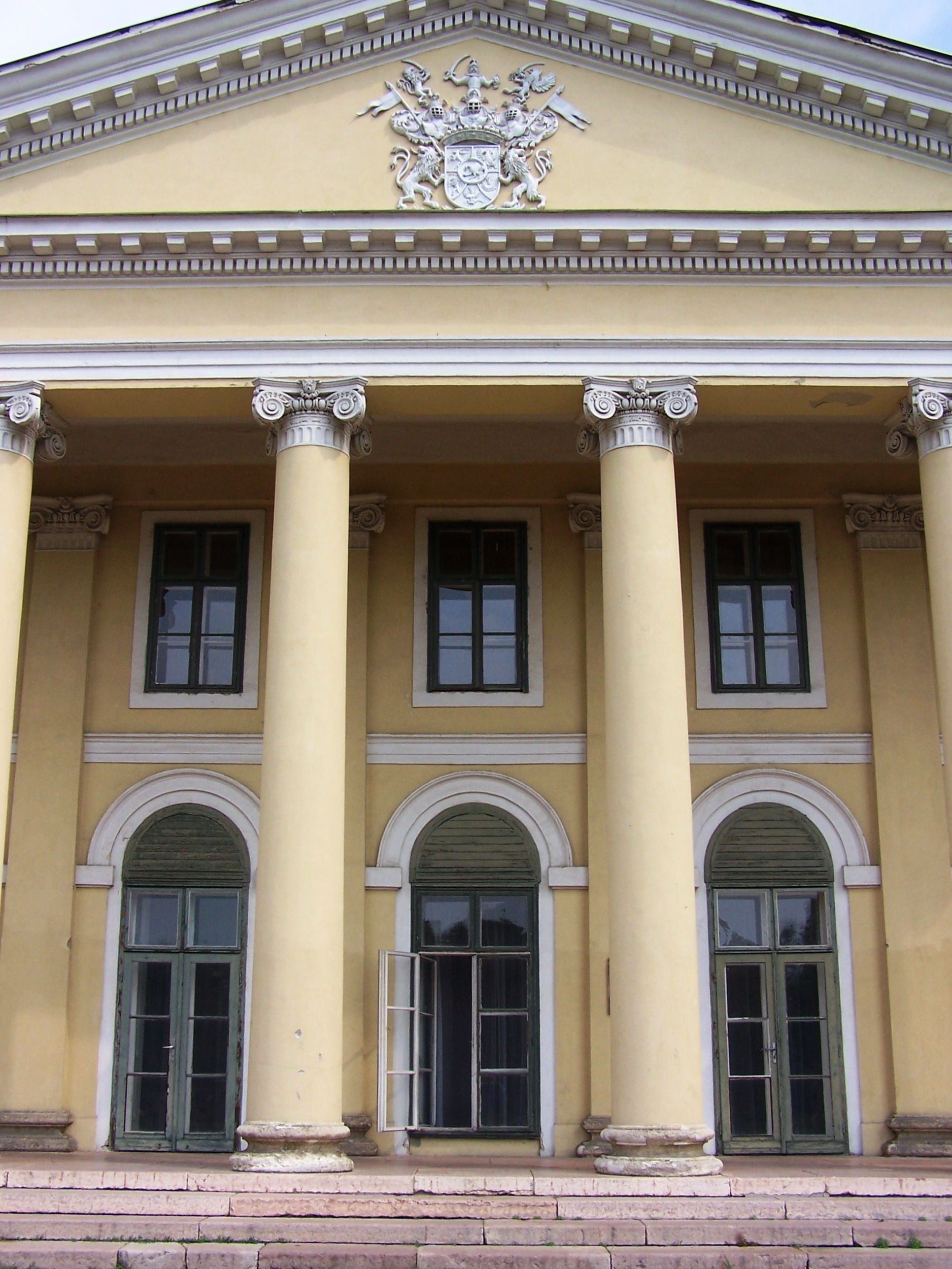 Volt Károlyi kastély (Fót, Vörösmarty Mihály tér 2.) This is a photo of a monument in Hungary, Identifier: 7023